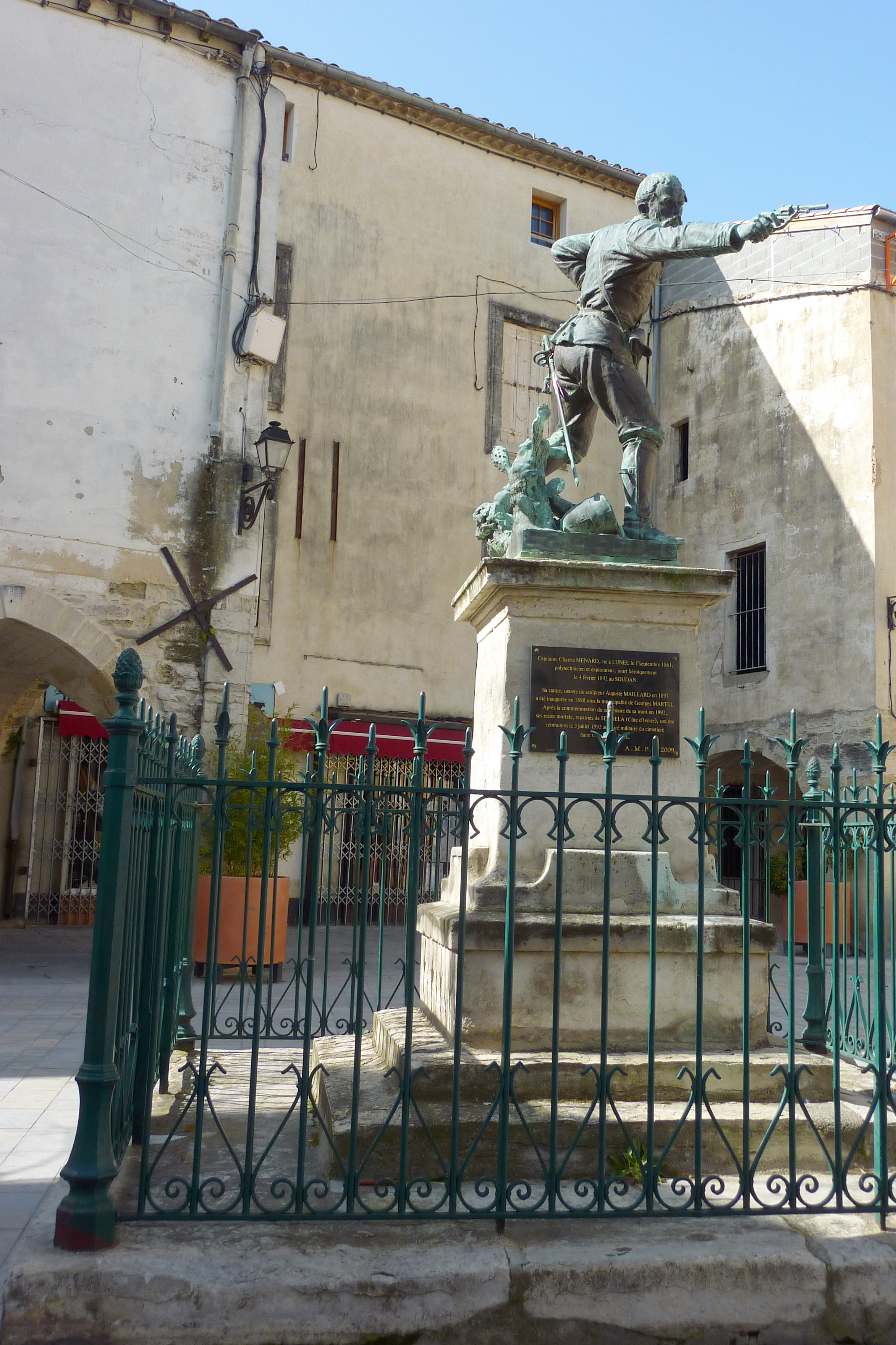 Denkmal für Charles Menard in Lunel, geschaffen von Auguste Maillard